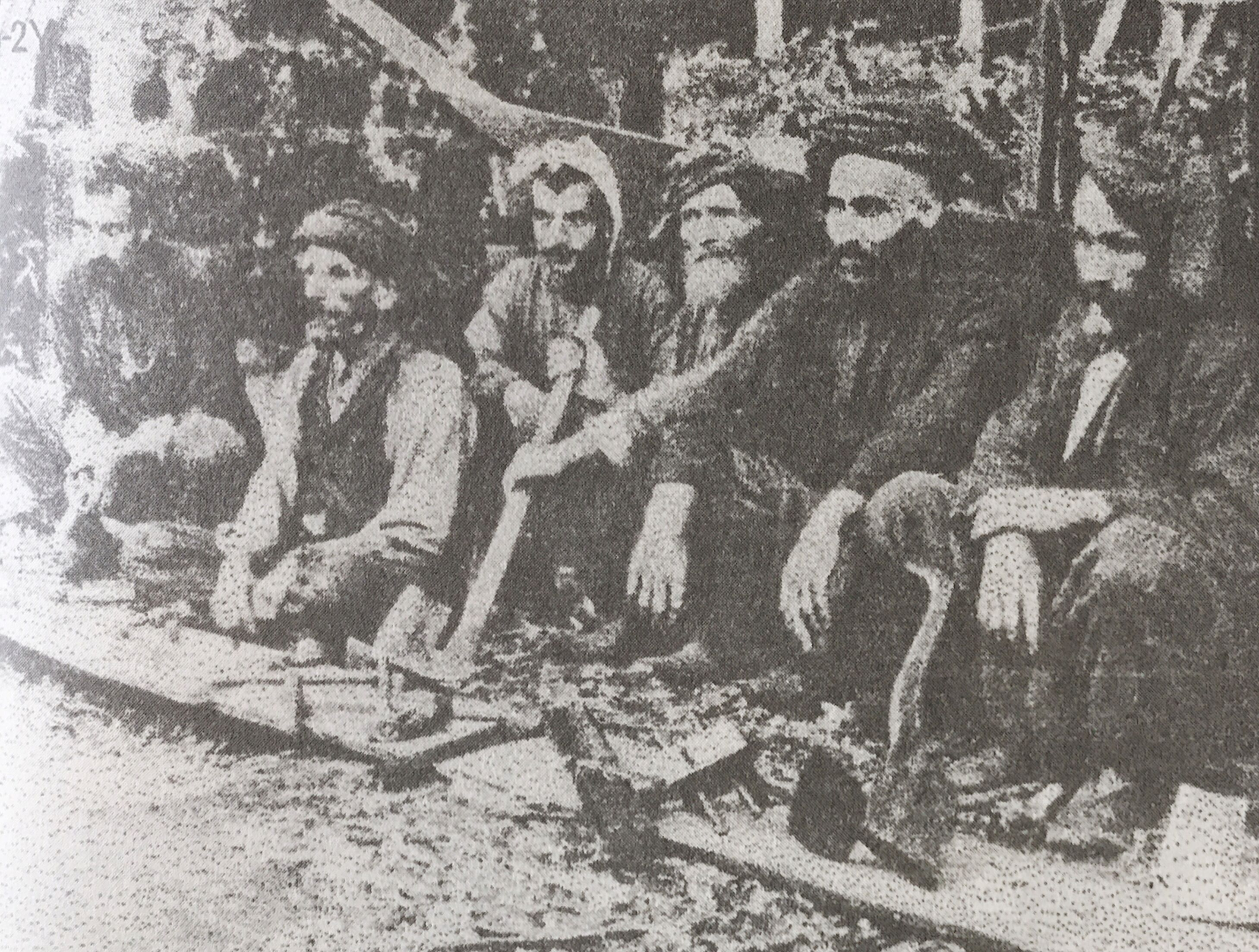 Çoruh vadisinde kayık yapımcıları